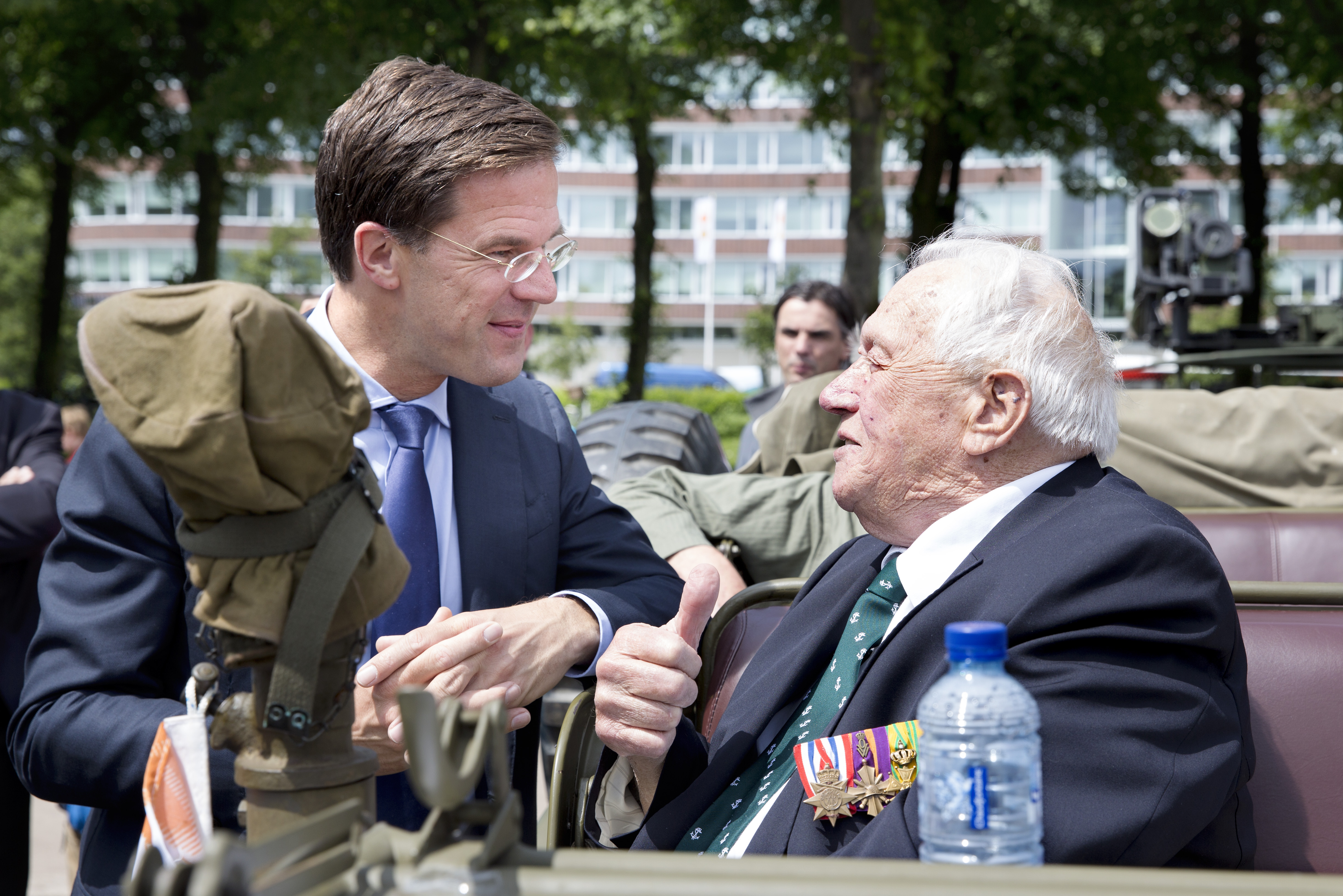 Minister-president Rutte proeft na afloop van het Nationaal Defilé de sfeer op het Malieveld en spreekt daar met diverse veteranen. Veteranendag is een eerbetoon aan alle Nederlandse veteranen die zich hebben ingezet in dienst van de vrede. Lees hier meer over Veteranendag